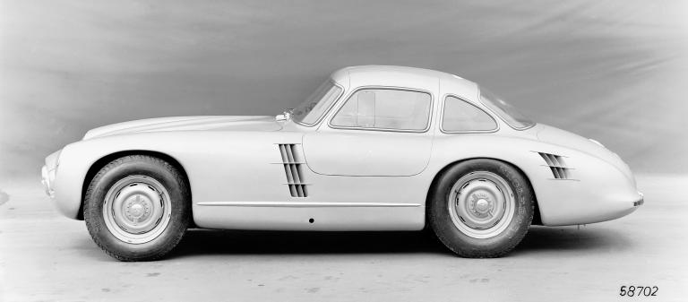 Bildbeschreibung: Mercedes-Benz 300 SL Rennwagen Prototyp* Quelle: Mediaseite der DaimlerChryslerAG Genehmigung: Gern können Sie für Ihre Tätigkeit für die Wikipedia Inhalte der DaimlerChrysler Medienseiten verwenden. Dazu erkennen wir die Bedingungen nach GNU-FDL an. Das Angebot bezieht sich auch auf die vorhandenen Bilder.(Dr.Josef Ernst, Communications, DaimlerChrysler AG)